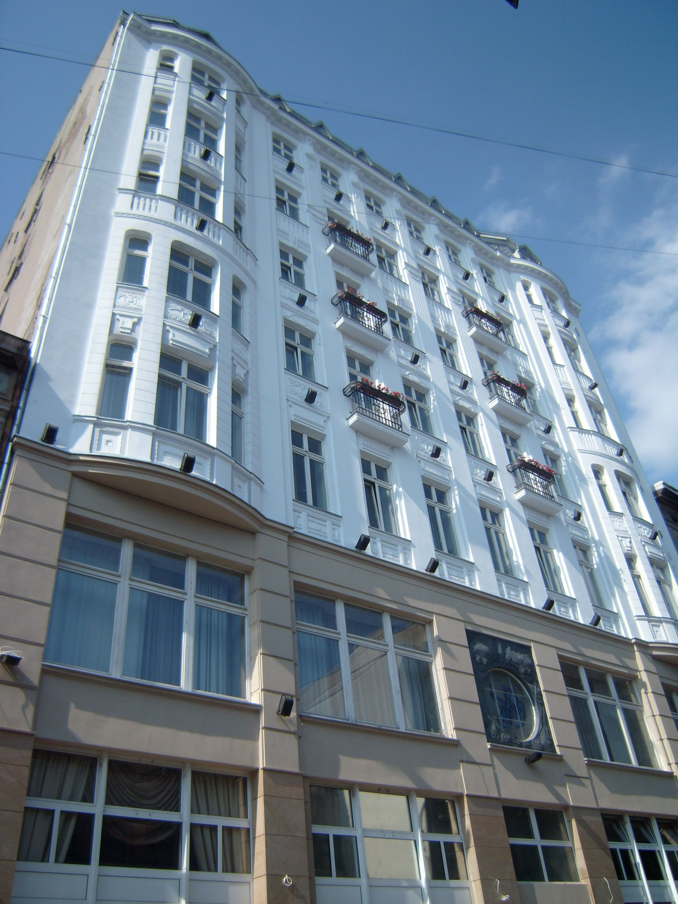 Hotel Savoy w Łodzi po renowacji.